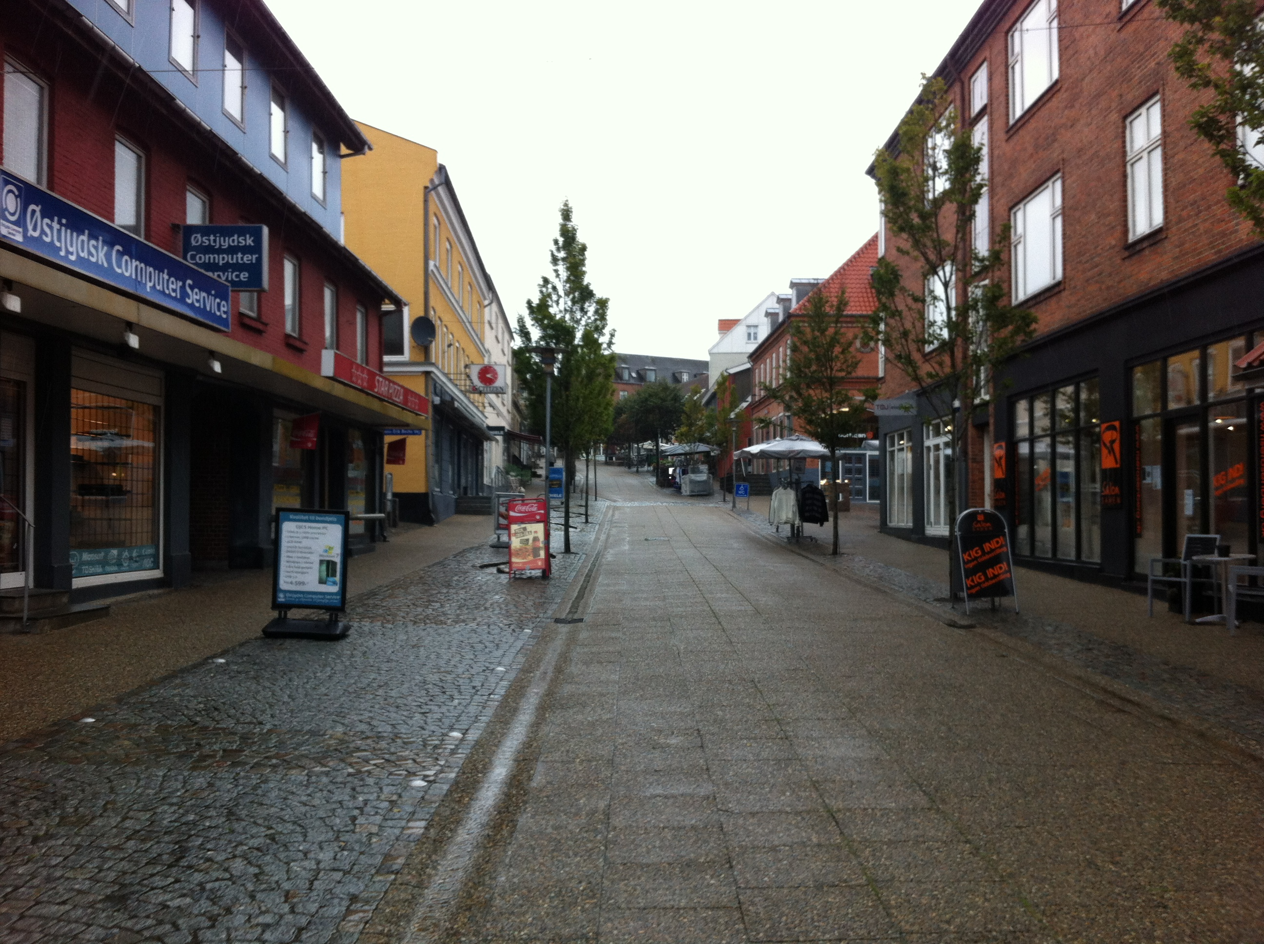 Storegade (Hadsund Gågade) set nord for Mejerigade.